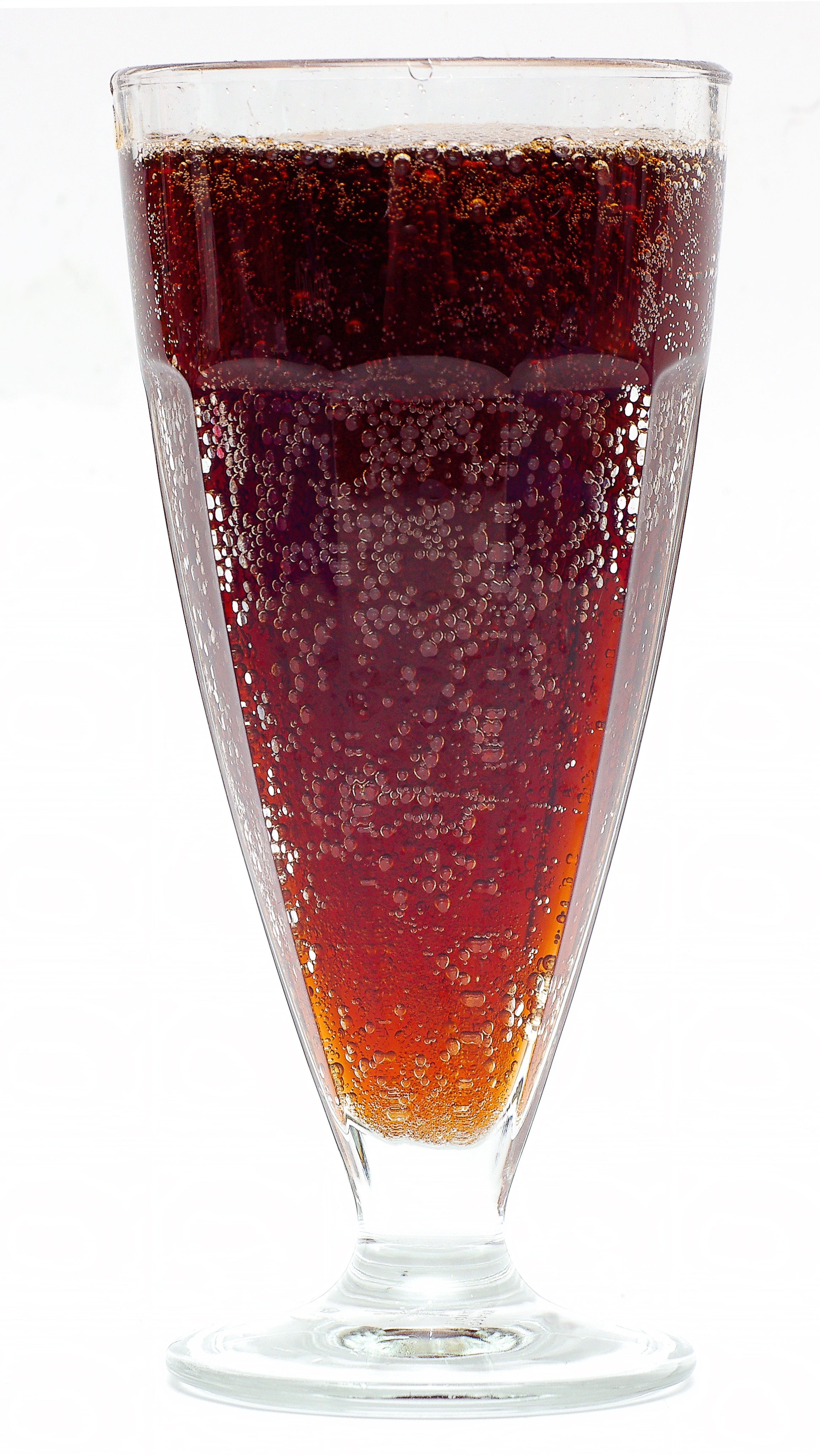 Напиток Байкал